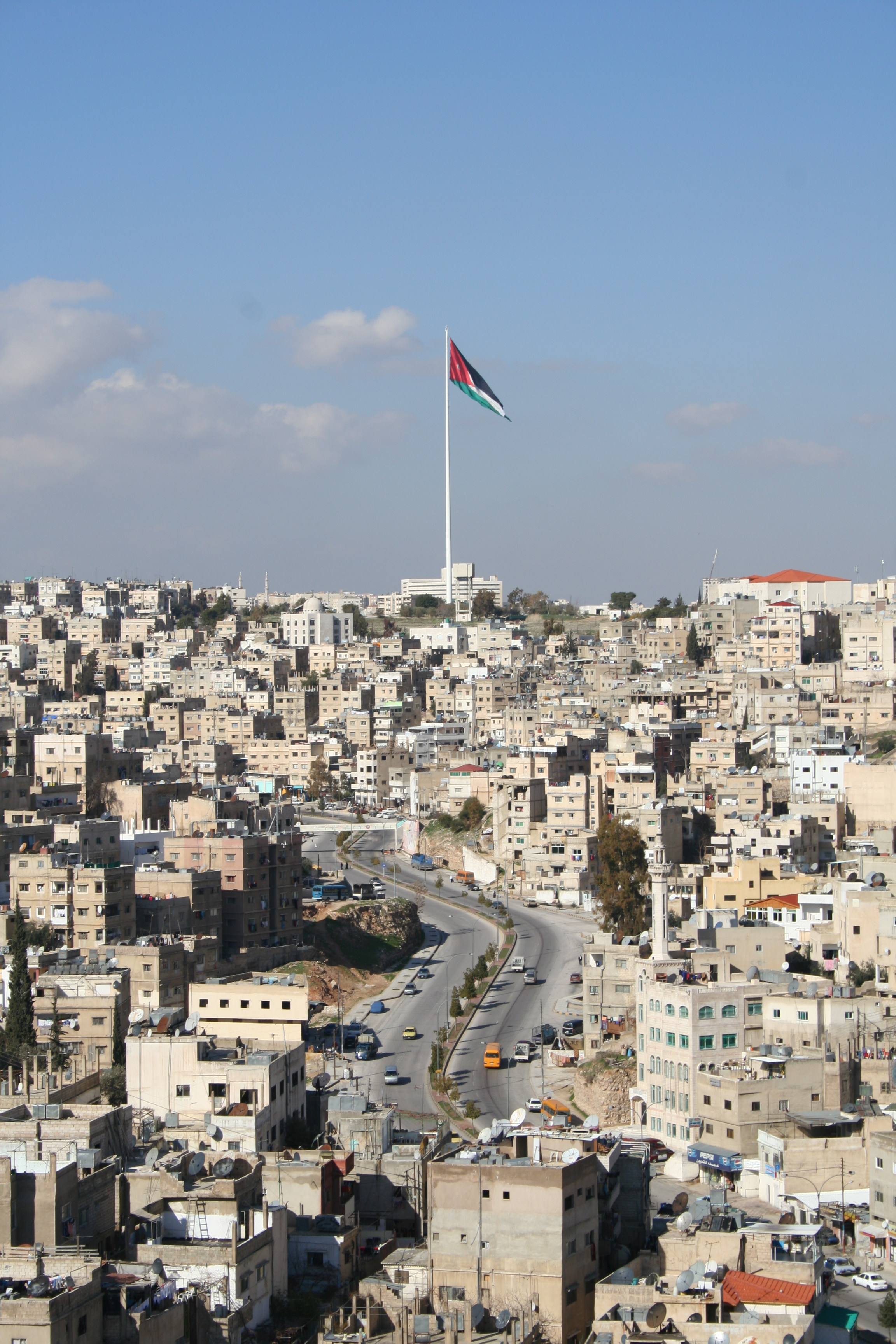 Vue panoramique sur Al Urdon Street, depuis la citadelle d'Amman.